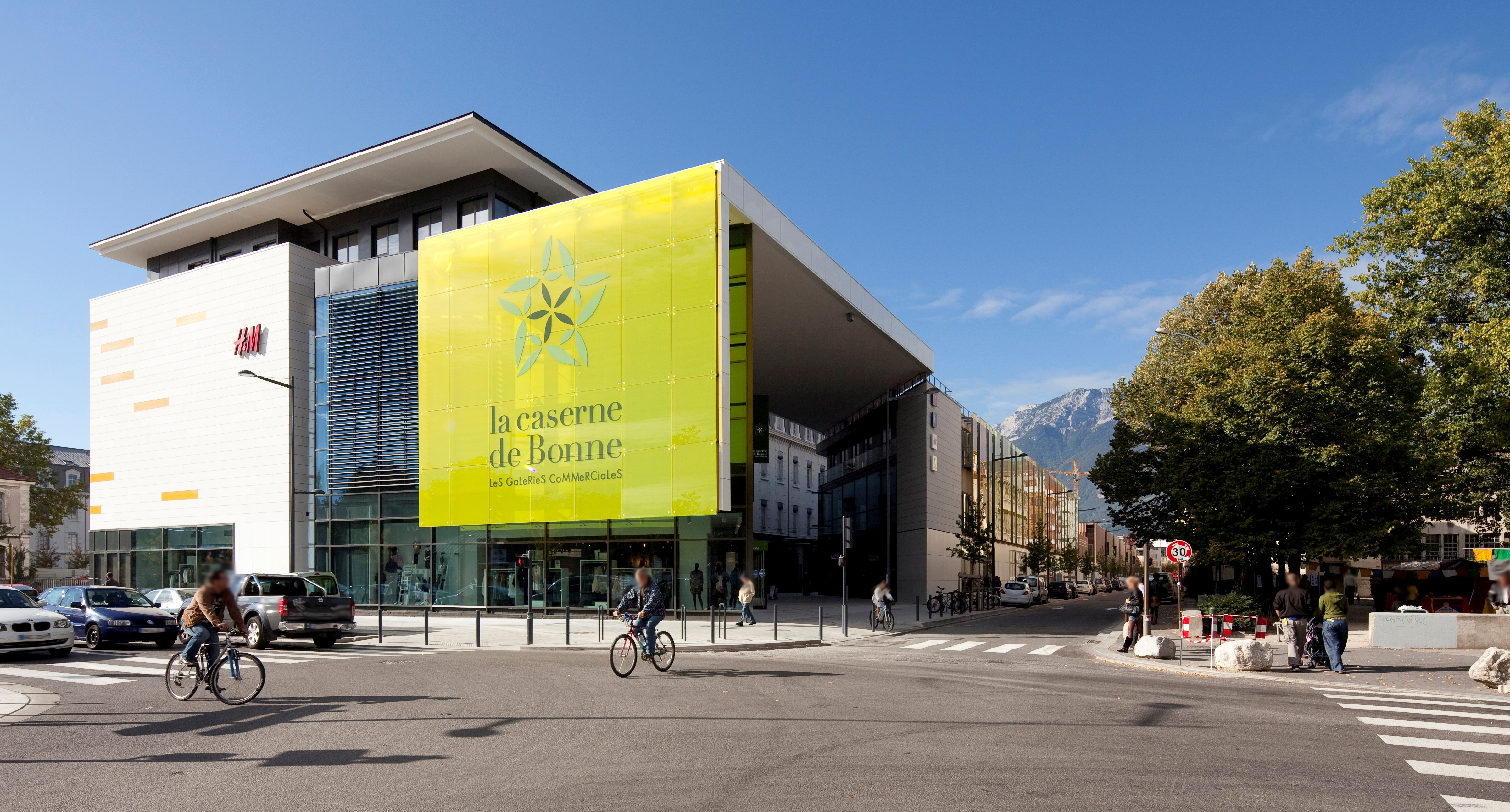 Le centre commercial de la Caserne De Bonne est un lieu de vie au cœur de la ville de Grenoble. On peut y faire son shopping, se promener en famille grâce à des parcs, bassins et jeux pour enfants, se restaurer... Le bâtiment HQE (hautes qualités environnementales) se situe dans l'éco-quartier de Bonne, à deux pas du centre ville.